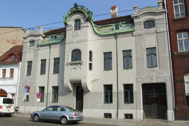 Villa Lehmann, Plauer Straße in Brandenburg/Havel, Jugendstilfassade nach einem Entwurf von Bruno Möhring. Otto Stichling schuf das Relief am Erker des Hauses 1902.